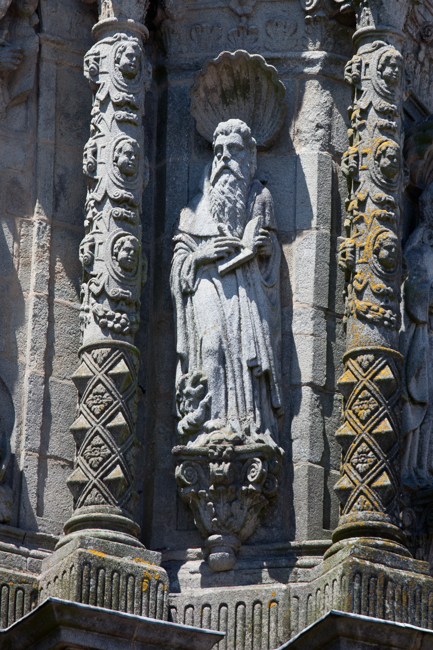 Mosteiro de San Martiño Pinario. Santiago de Compostela, Galicia (Spain)